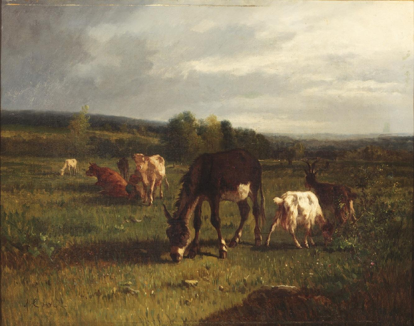 La obra representa a un grupo de animales en un prado.